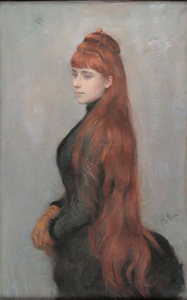 Description Caption from the museum: "Grâce à son ami Rafael de Ochoa y Madrazo, Paul-César Helleu reçoit la commande de l’un de ses premiers grand pastels, par M. et Mme Louis-Guérin. C’est leur fille Alice, à 14 ans, qui est représentée par l’artiste en 1884. Dans ce portrait, Paul-César Helleu prouve sa maîtrise de la technique du pastel sur toile, travaillé dans une gamme restreinte de couleurs. Les gris et noir bleutés mettent en valeur l’opulente chevelure rousse avec élégance et une certaine sobriété qui s’accorde avec la pose réservée de la jeune femme. Cette toile est présentée au Salon de la Société des Artistes français, à Paris, l’année suivante et suscite l’intérêt des critiques. Elle reflète deux aspects de l’œuvre d’Helleu : son talent de pastelliste et l’apparition d’un modèle incontournable. En effet, Helleu tombe amoureux d’Alice qu’il épousera an 1886. Très rapidement, elle devient l’incarnation de la femme élégante, de la mère aimante et de l’épouse gracieuse saisie dans ses gestes quotidiens, à travers toutes les techniques employées par Helleu : peinture, dessin, pastel, gravure. "